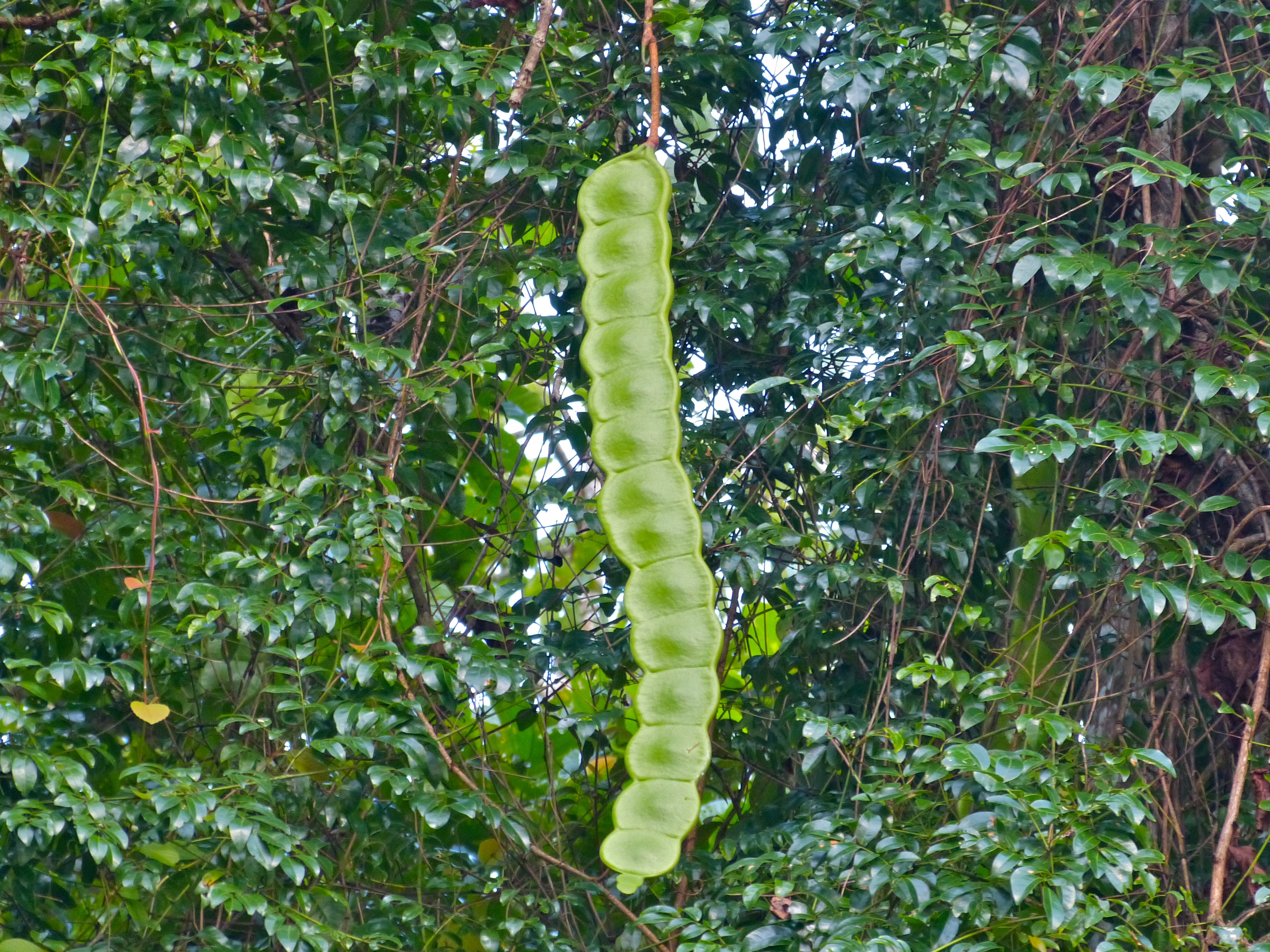 Kinabatangan River, Sukau, Sabah, MALAYSIA